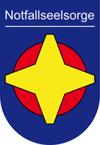 Logo der Notfallseelorge